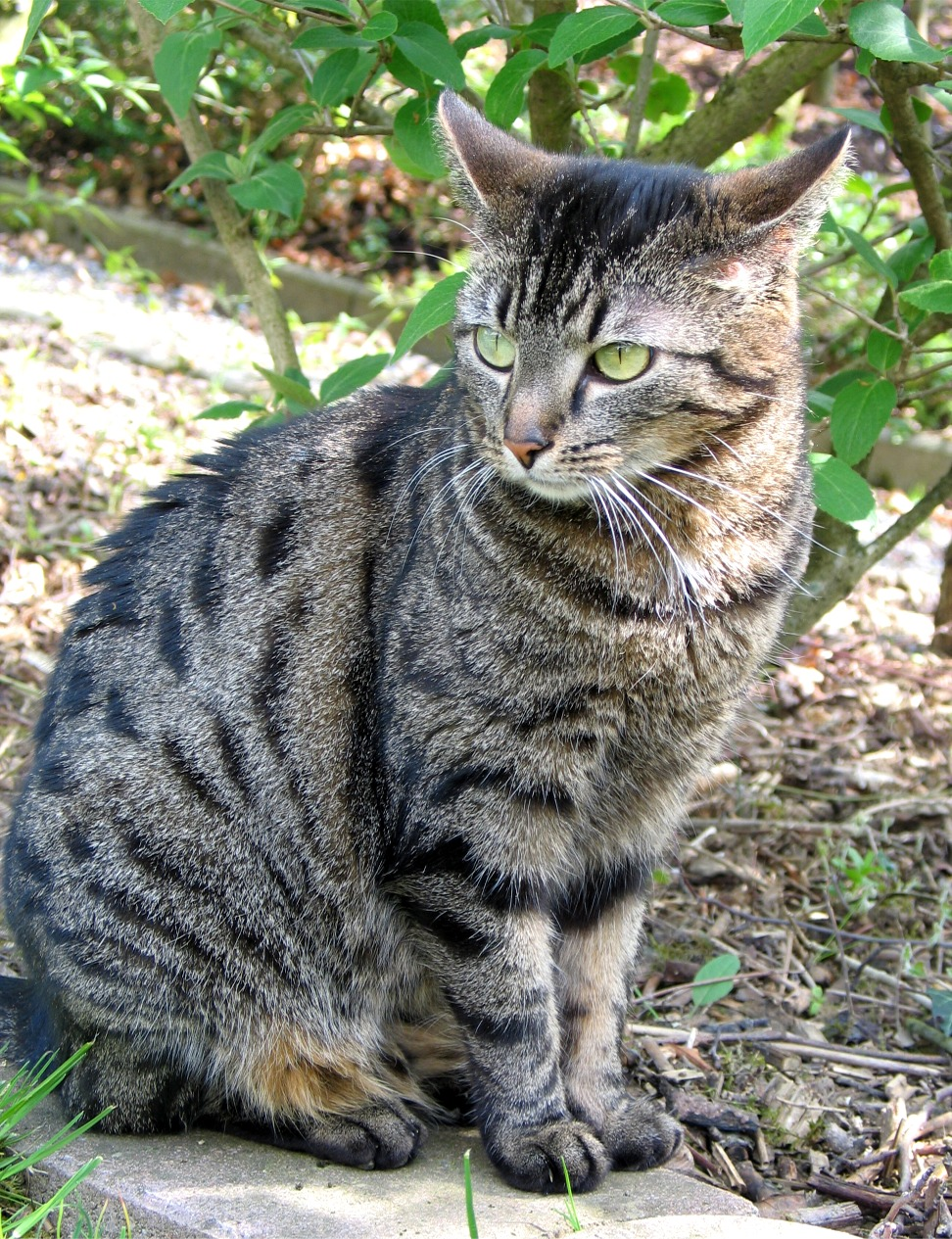 Hauskatze